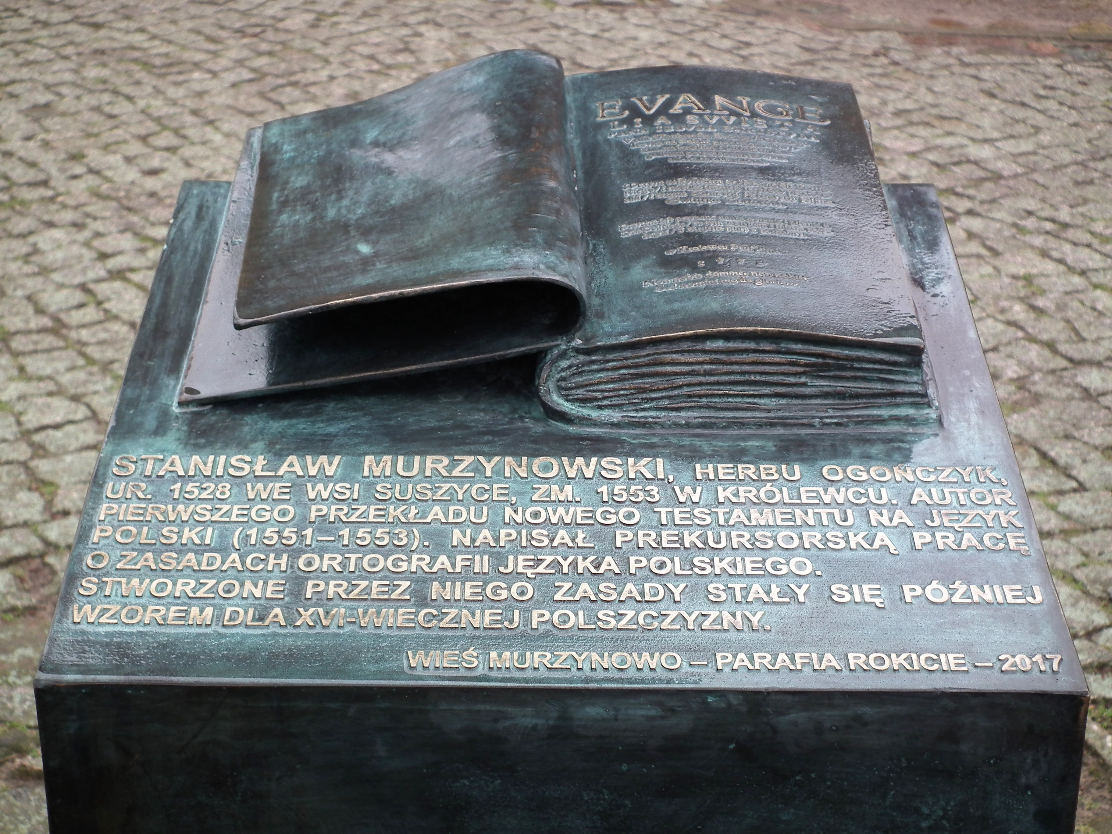 Pomnik pierwszego polskiego Nowego Testamentu Stanisława Murzynowskiego (1553) stojący przy kościele św. Piotra i Pawła w Rokiciu koło Płocka. Na jednym z boków znajduje się oryginalne tłumaczenie Ośmiu Błogosławieństw.